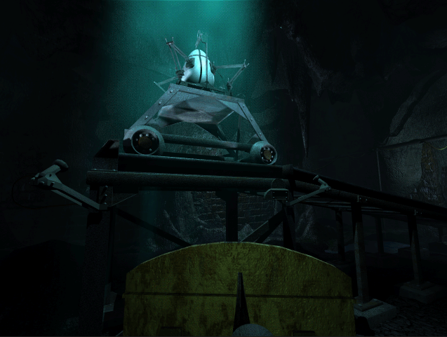 Capture d'écran du jeu vidéo L'Amerzone (1999), développé et édité par Microïds.